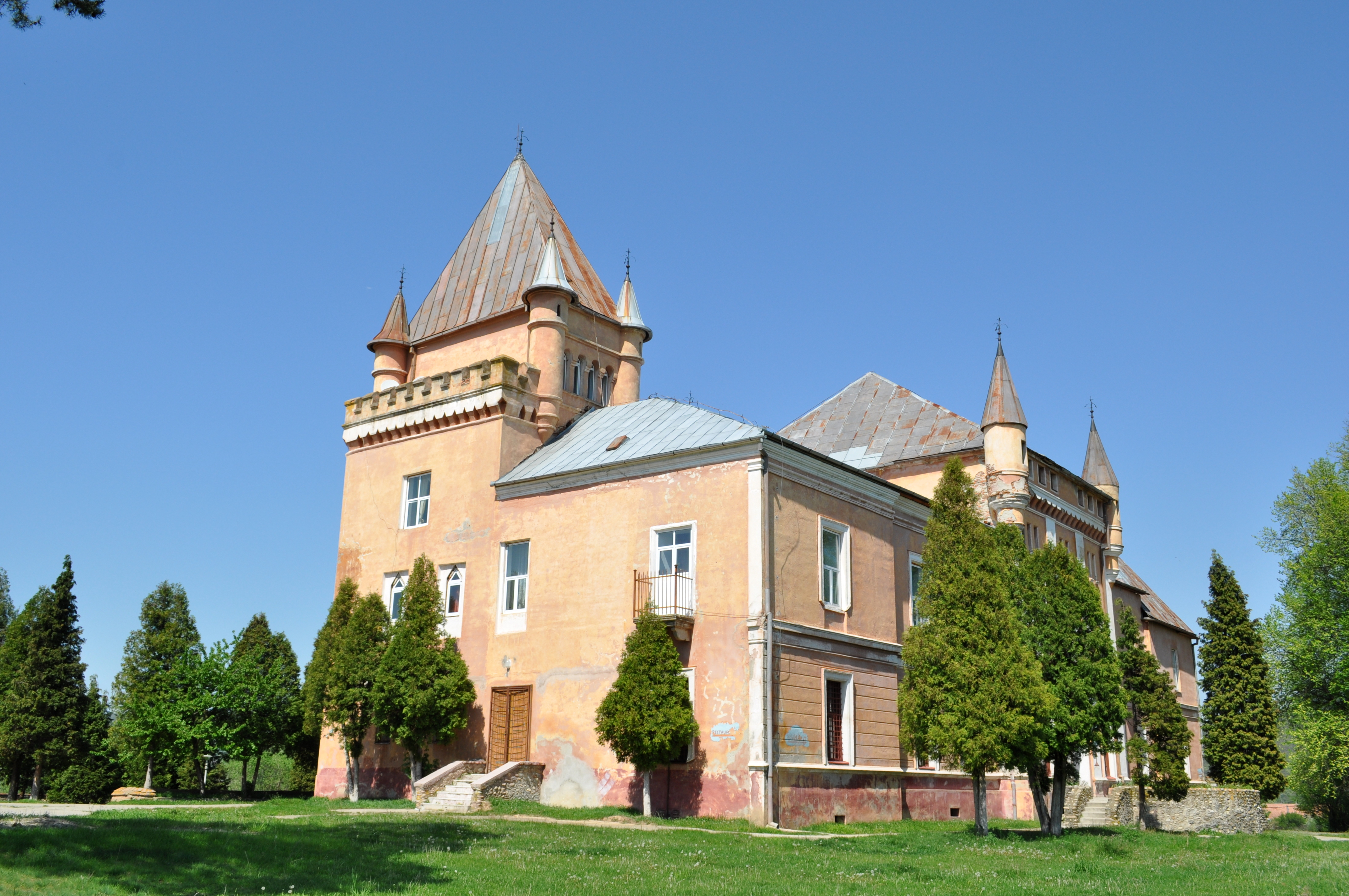 Castelul Kendeffy din Sântămăria-Orlea, județul Hunedoara 01